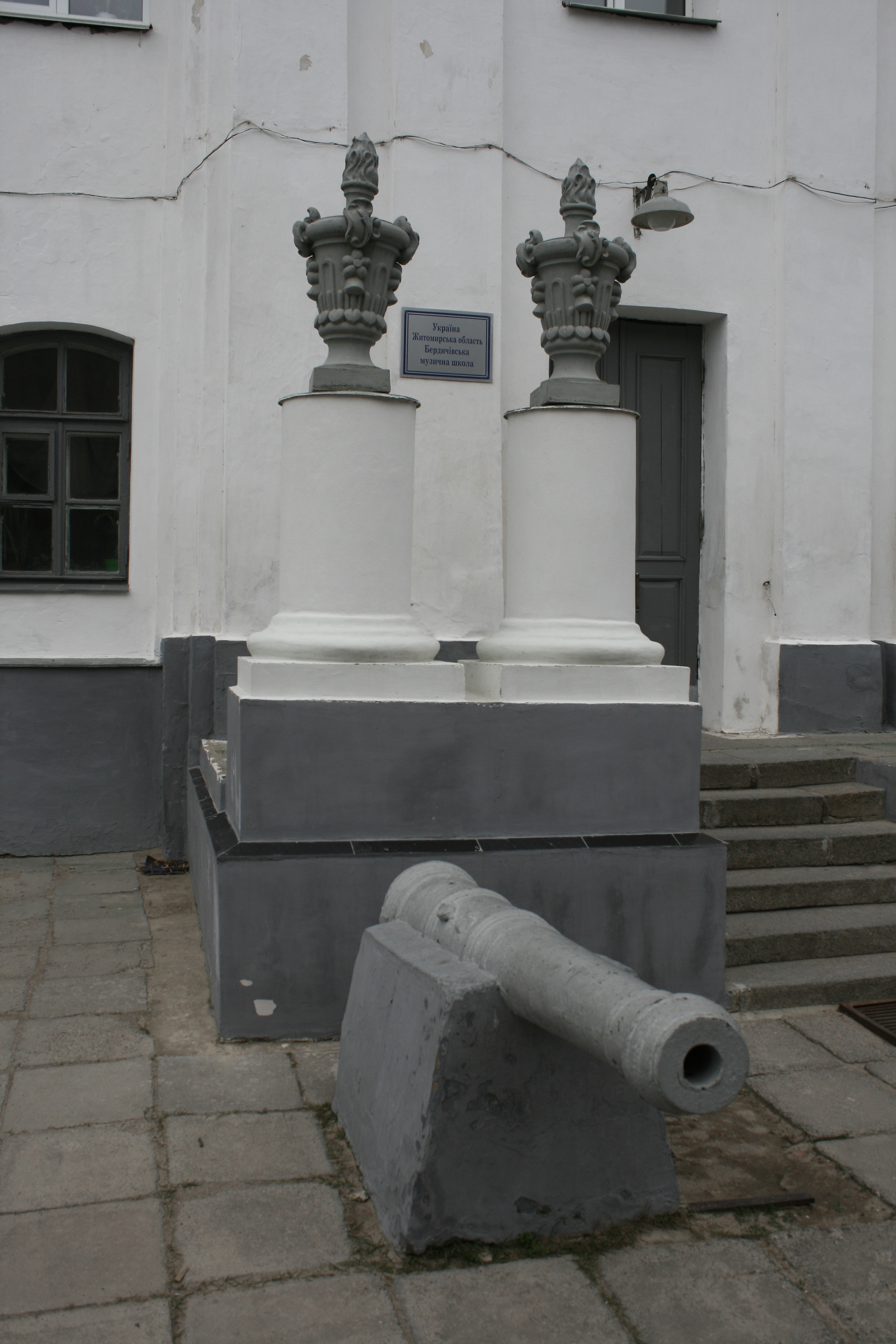 Бердичів, Соборна пл., 25, Монастир Босих Кармелітів, малі архітектурні форми біля входу в костел